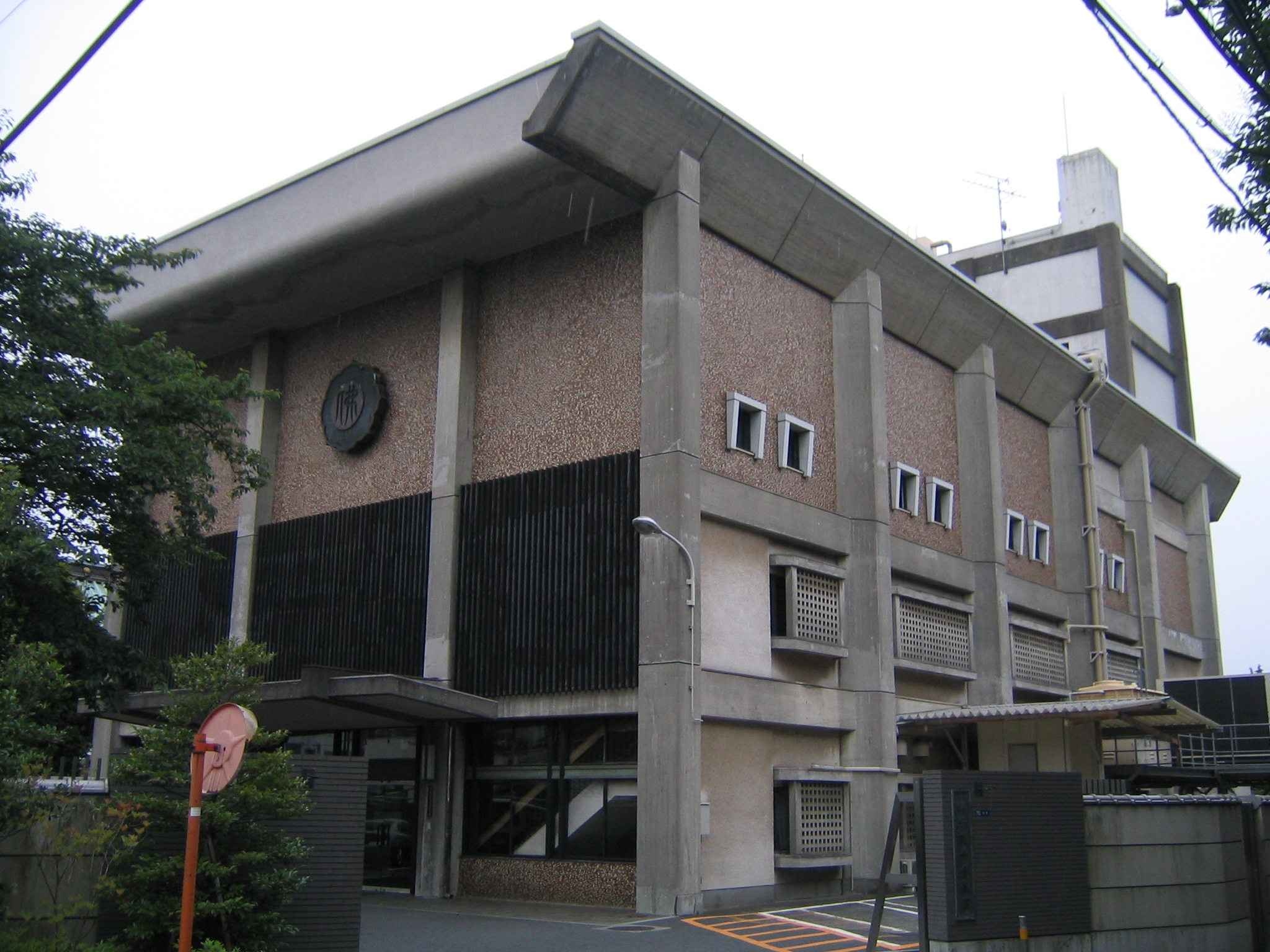 仏所護念会教団本部